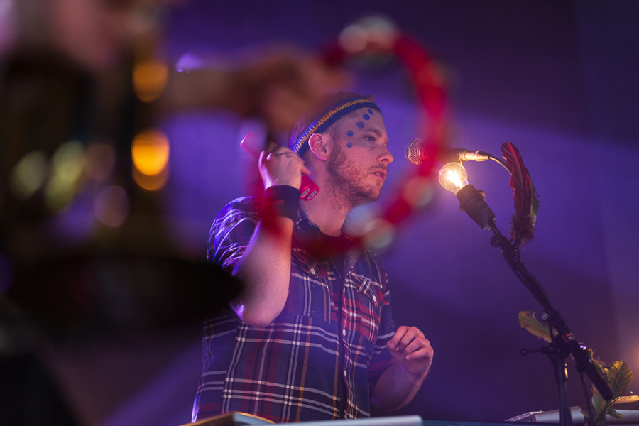 Tidligere bandmedlem Øystein Skar fra en opptreden på Roskilde-festivalen 2013.